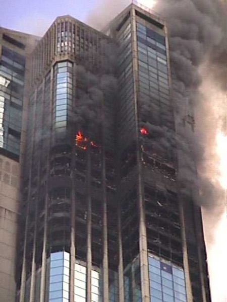 Incendio en la torre sur del Complejo Parque Central en Caracas - Venezuela (2004)